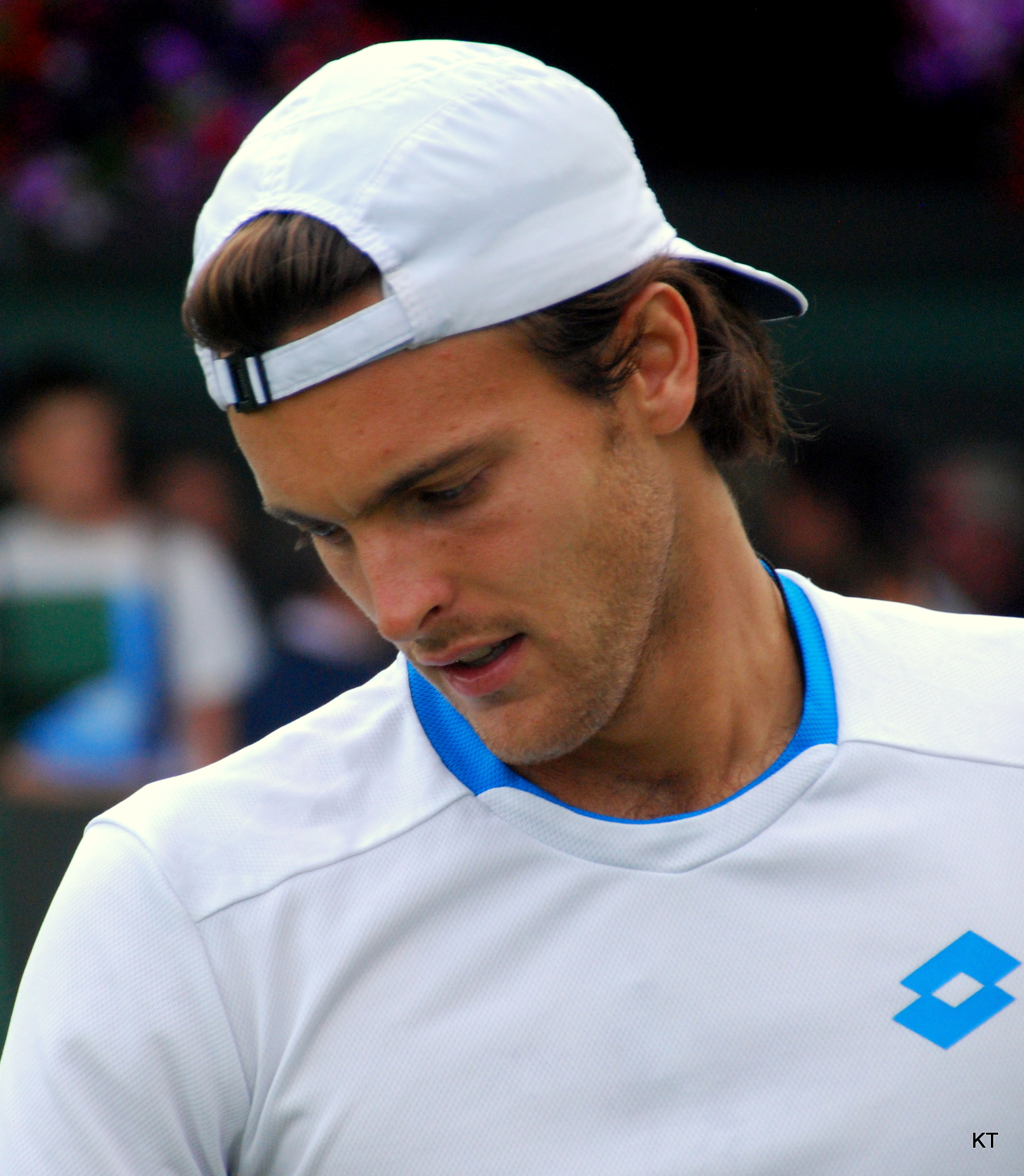 Joao Sousa